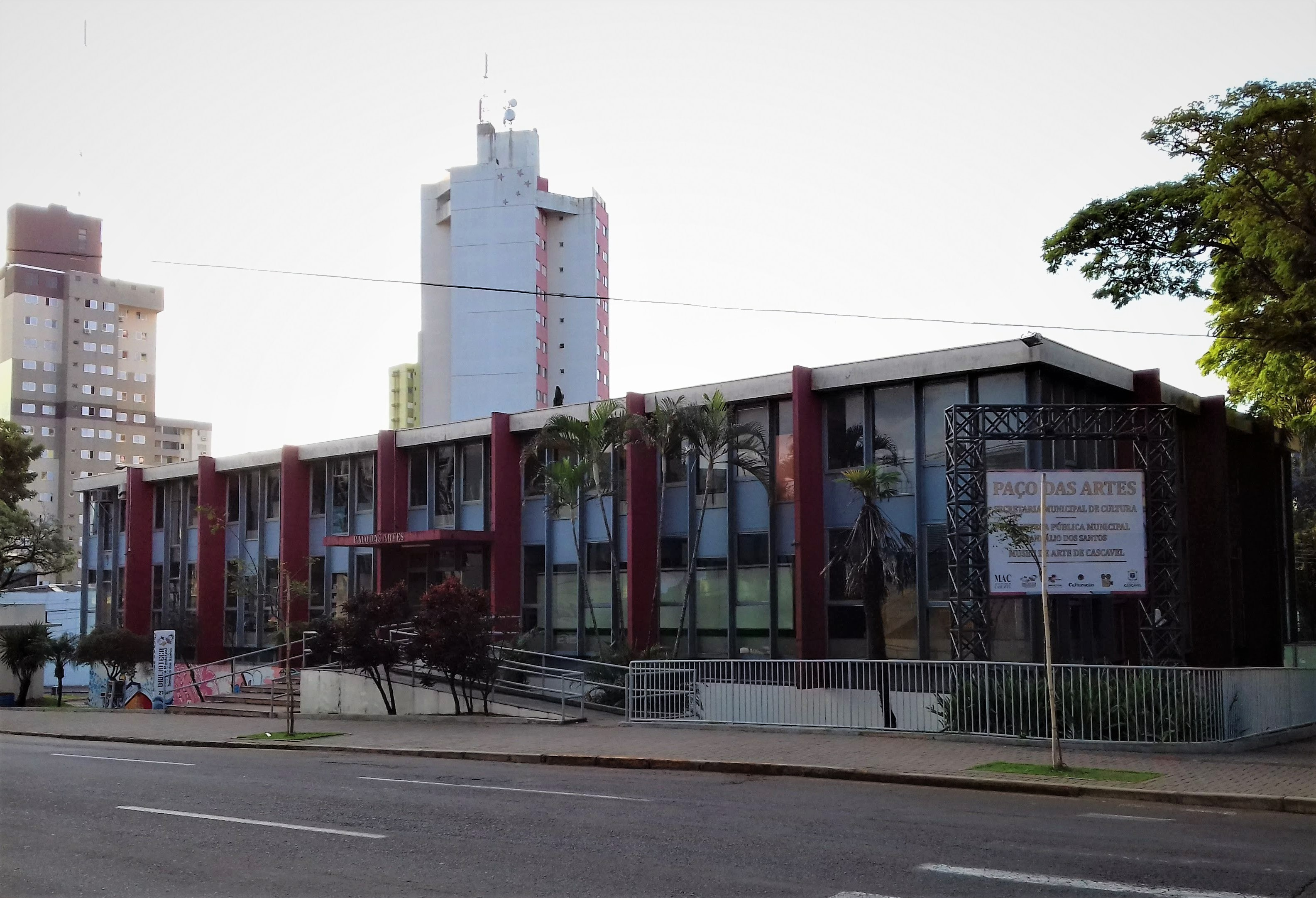 Paço das Artes - Local onde abriga a Biblioteca Municipal de Cascavel(PR)